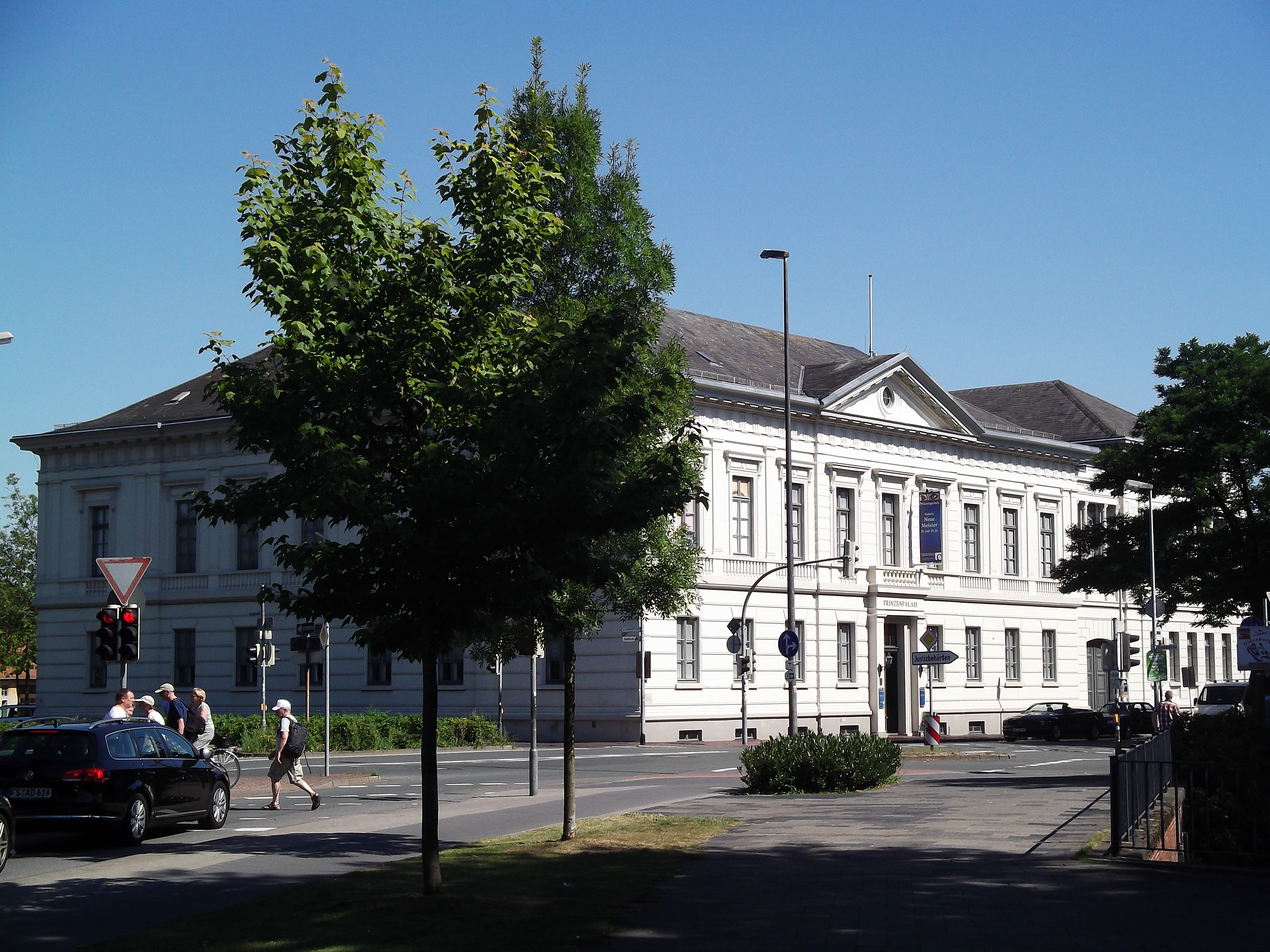 Prinzenpalais, Oldenburg (Oldb), Damm. Erbaut von 1821 bis 1826. Im Ersten Weltkrieg Lazarett. Von 1946 bis 1959 Graf-Anton-Günther Schule, ein Gymnasium in der Trägerschaft des Landkreises Oldenburg, 1922 gegründet. Später Katasteramt. Seit 2003 Teil des Landesmuseums für Kunst und Kulturgeschichte Oldenburg.